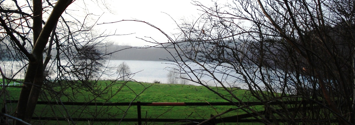 Der Heidensee bei Bösdorf, Kr. Plön